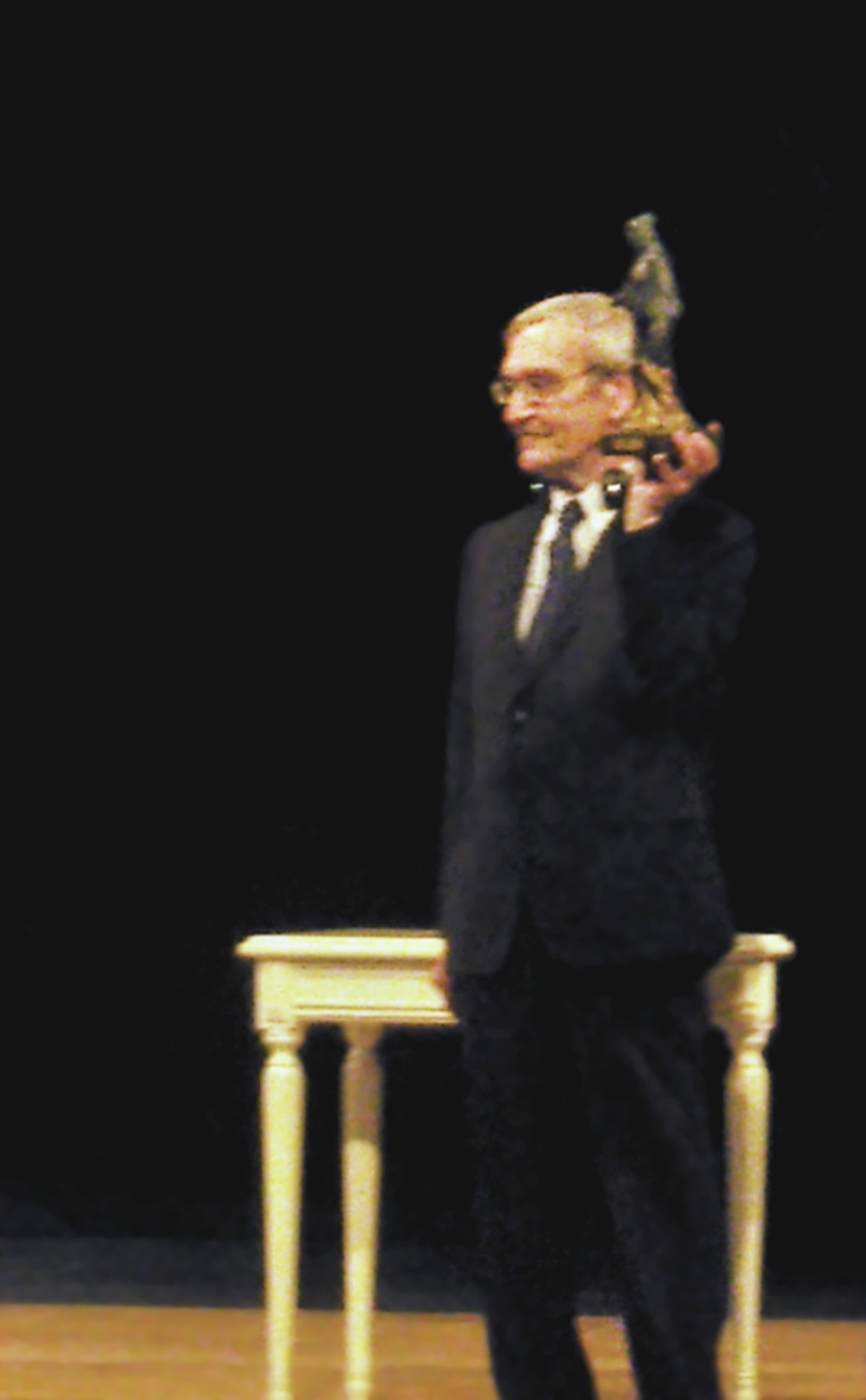 Stanislaw Jewgrafowitsch Petrow bei der Verleihung des Dresden-Preis in der Semperoper; Februar 2013